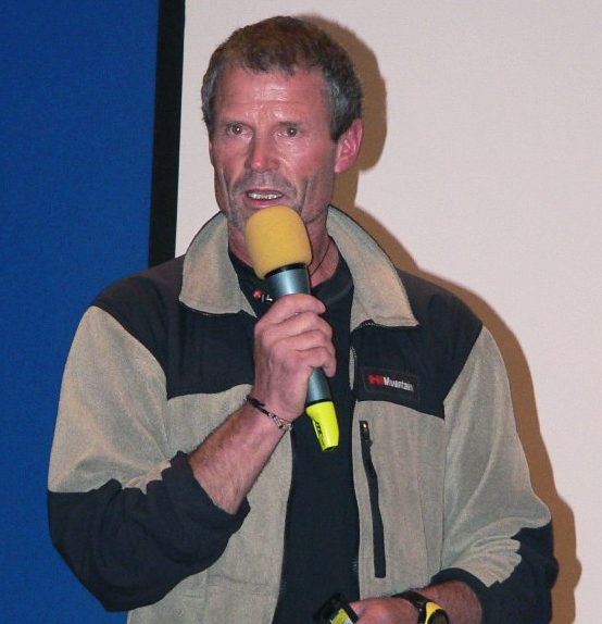 Ryszard Pawłowski - polish climber